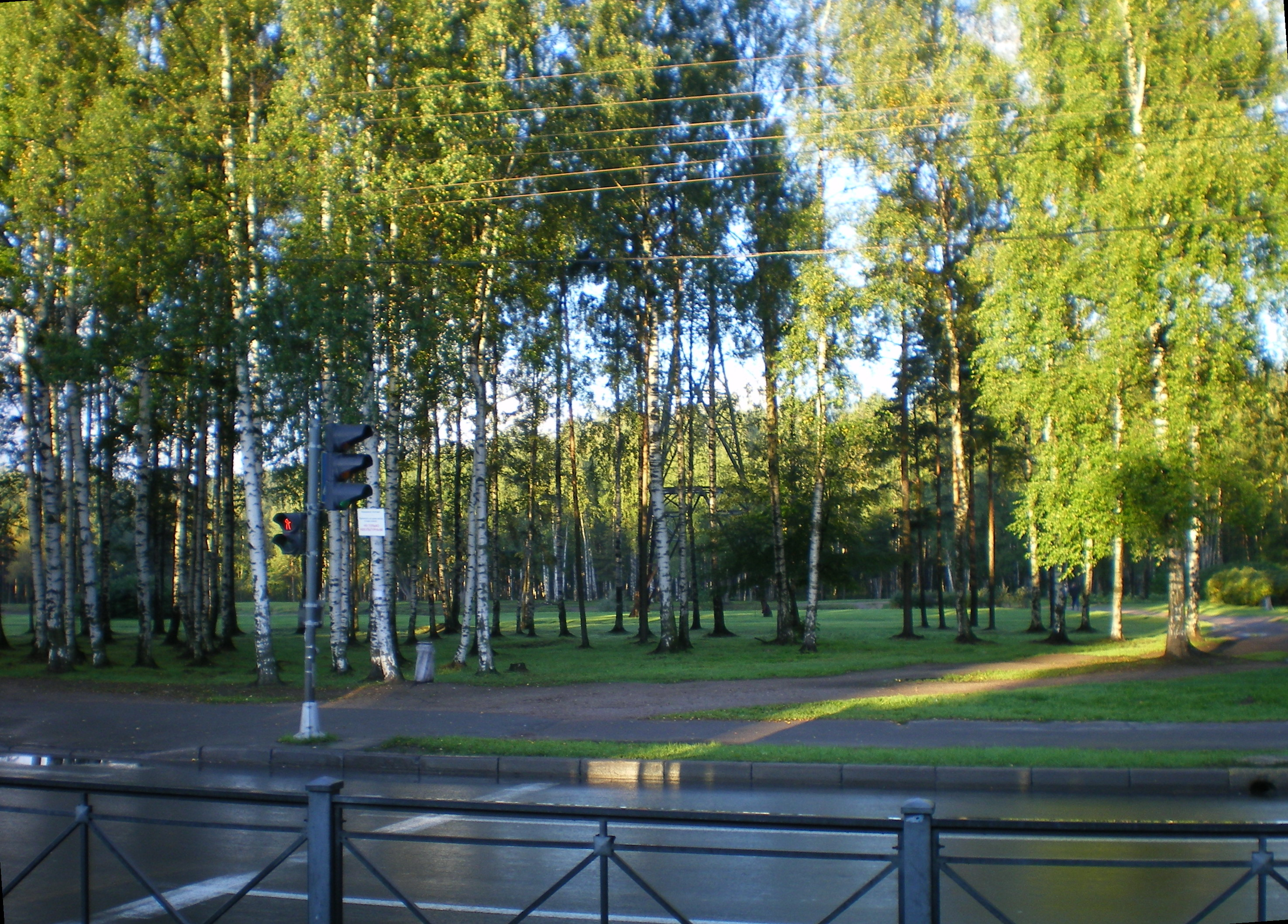 Sosnovka urban forest in Saint Petersburg as seen from Tikhoretsky Prospekt